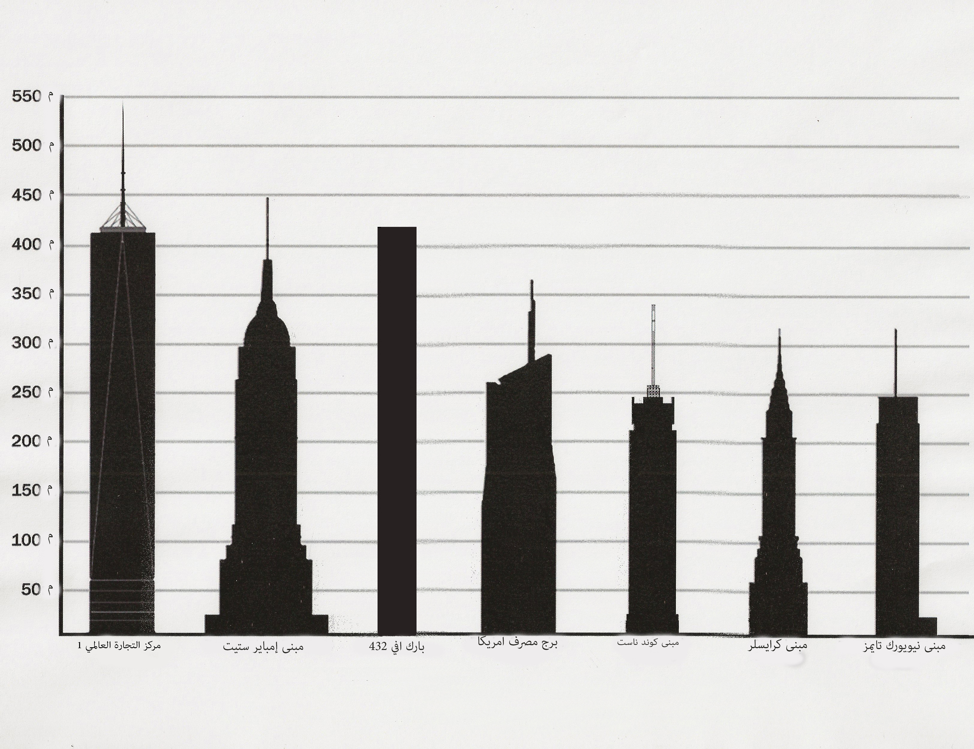 اطول 10 ابراج في مدينة نيويورك (تم ترجمة الصورة الى العربية)